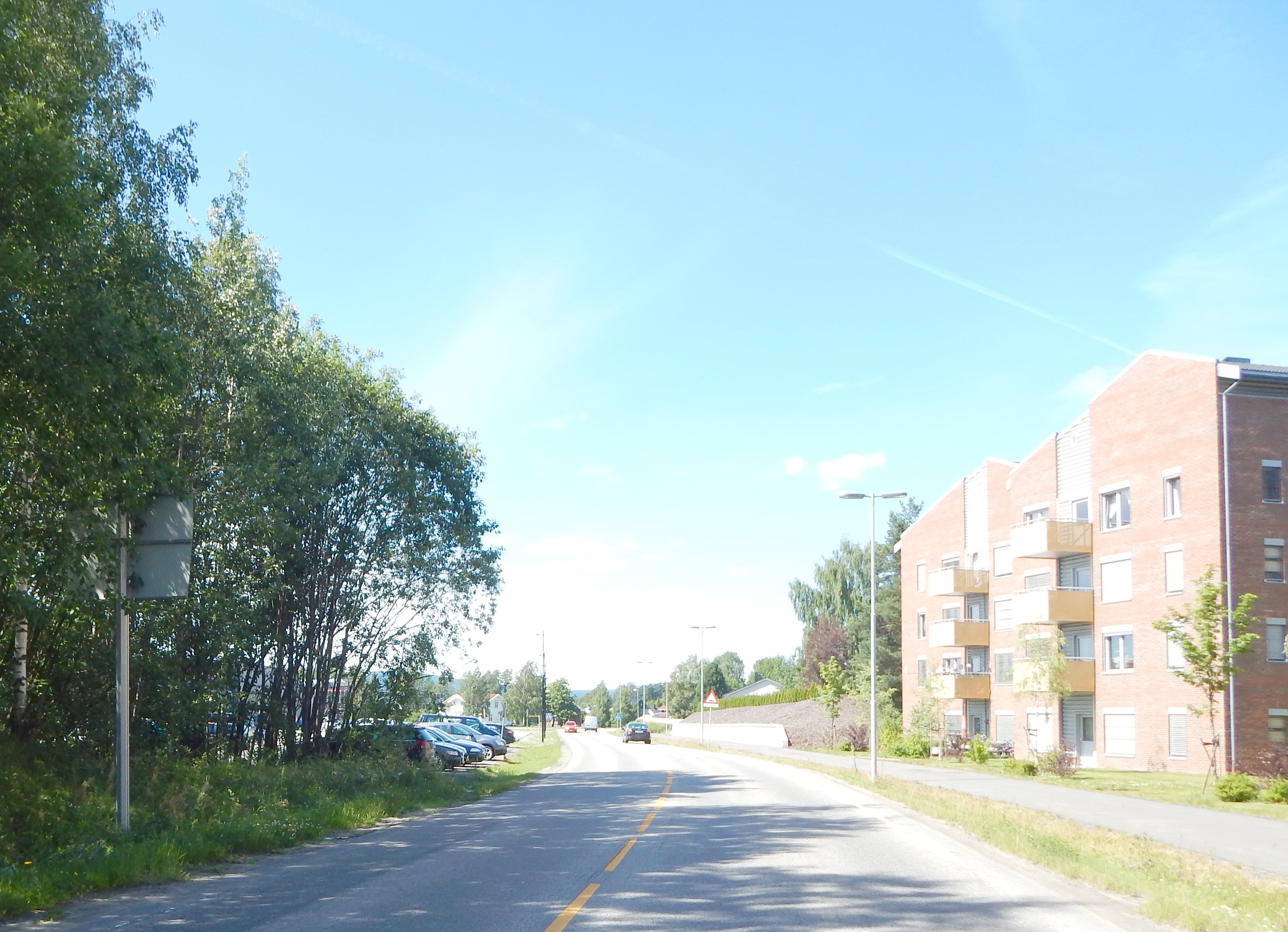 Strandbygdvegen på Elverum